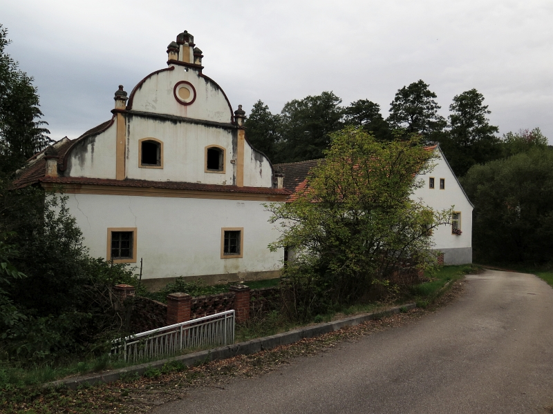 Vodní mlýn čp. 34, Těšovice 34, Těšovice (okres Prachatice).